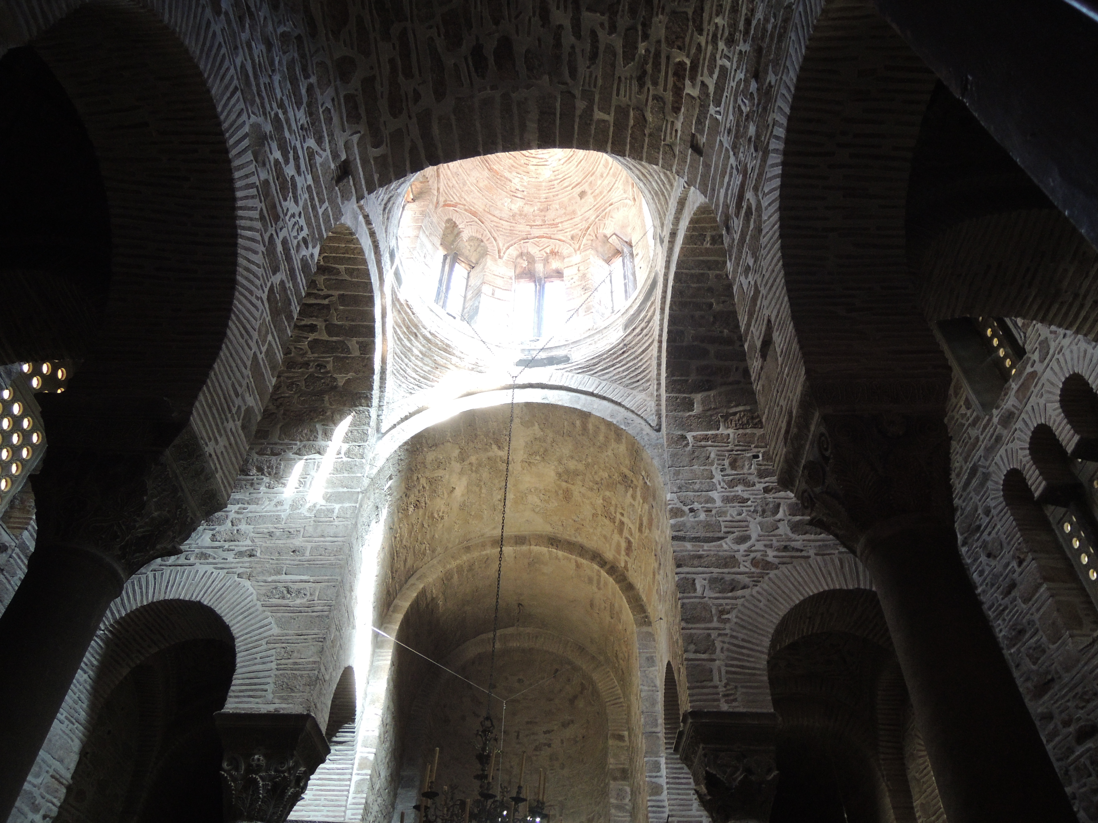 Монастырь Осиос Лукас